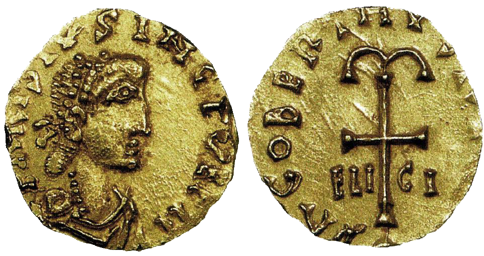 Tiers de sou d'or de Dagobert Ier. Avers : Effigie de Dagobert à droite, au diadème perlé. Revers : Croix ancrée, accostée des lettres ELI-CI.